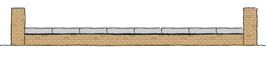 Babylonische Prachtstraße aus dem 7. Jahrhundert v. Chr.